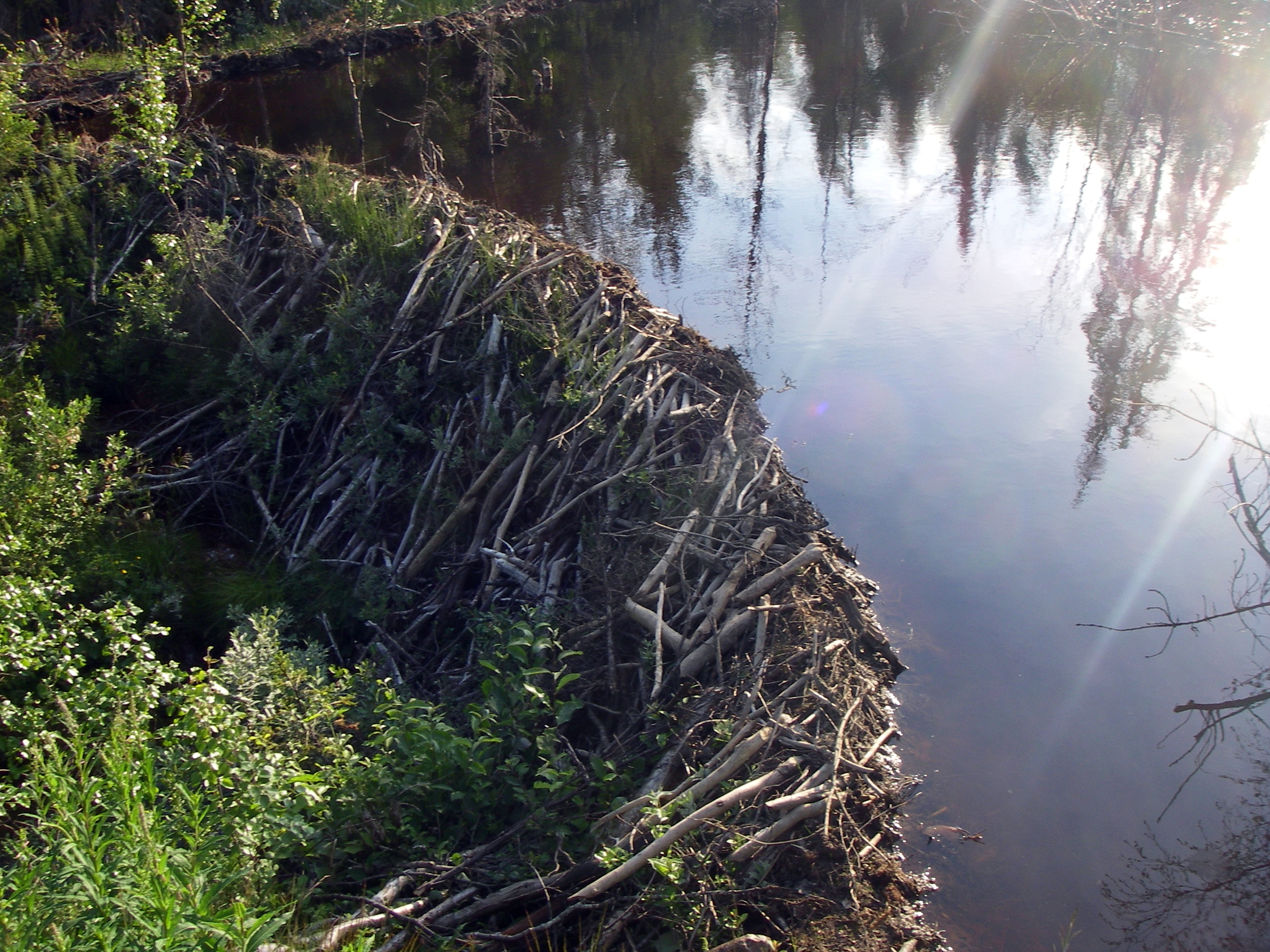 Large European Beaver (Castor fiber) dam near Olden, Jämtland, Sweden.